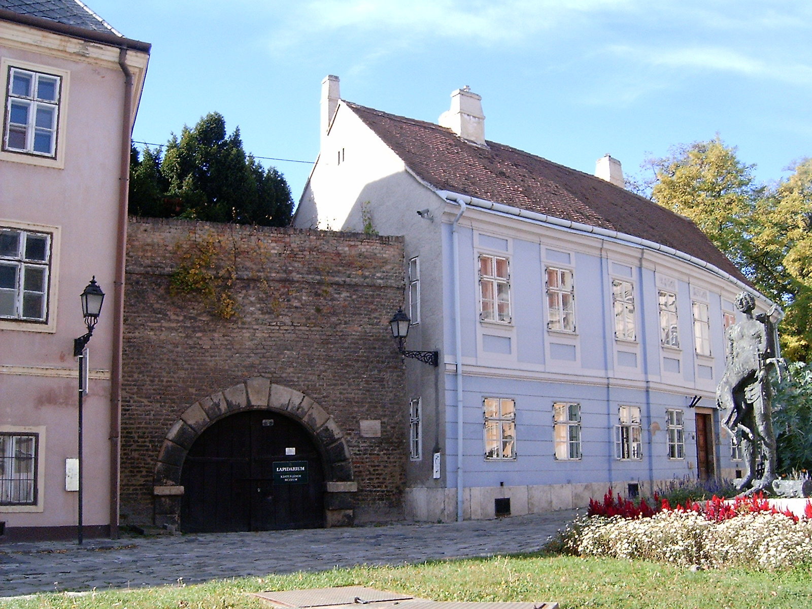 A Kőtár bejárata a Bécsi kapu téren (Győr) , saját kép